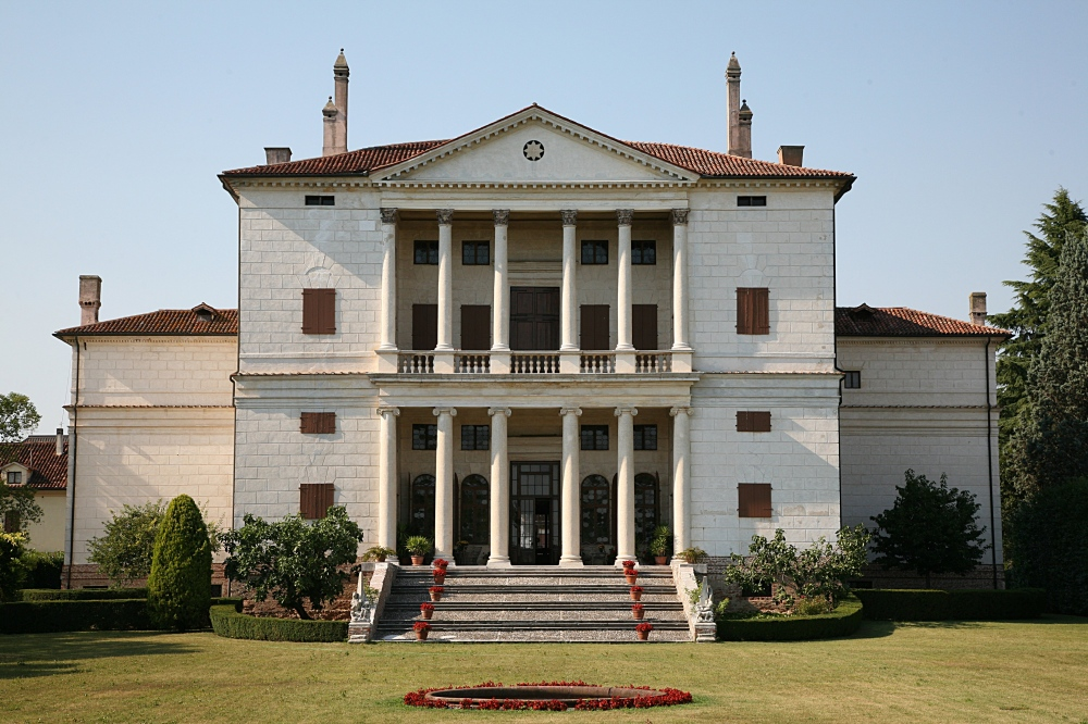 Villa Cornaro, Piombino Dese, Andrea Palladio Photo: Hans A. Rosbach License: GFDL & CC-BY-2.5